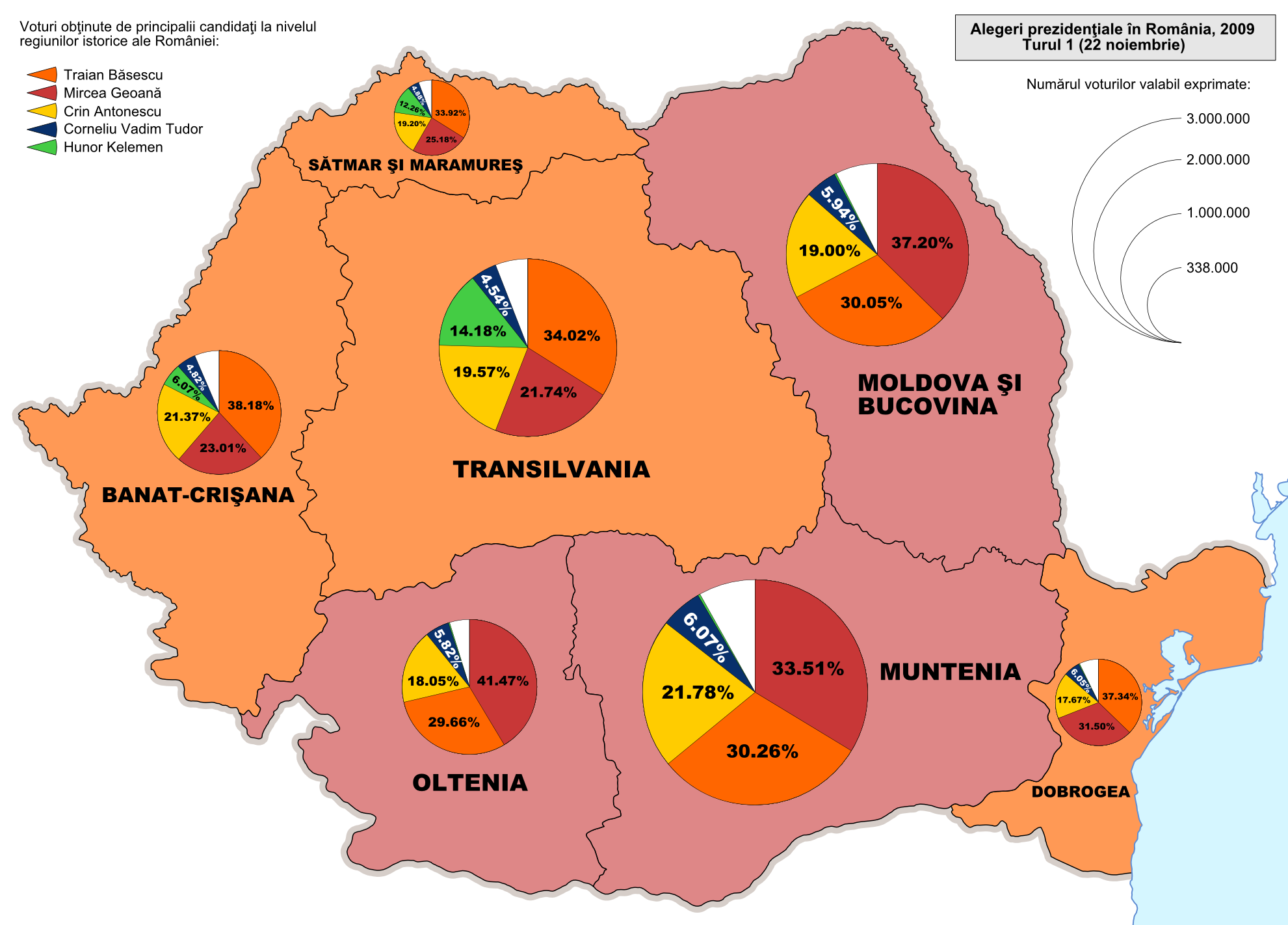 Rezultatele alegerilor prezidentiale din Romania la nivelul aproximativ al regiunilor istorice - turul I de scrutin.